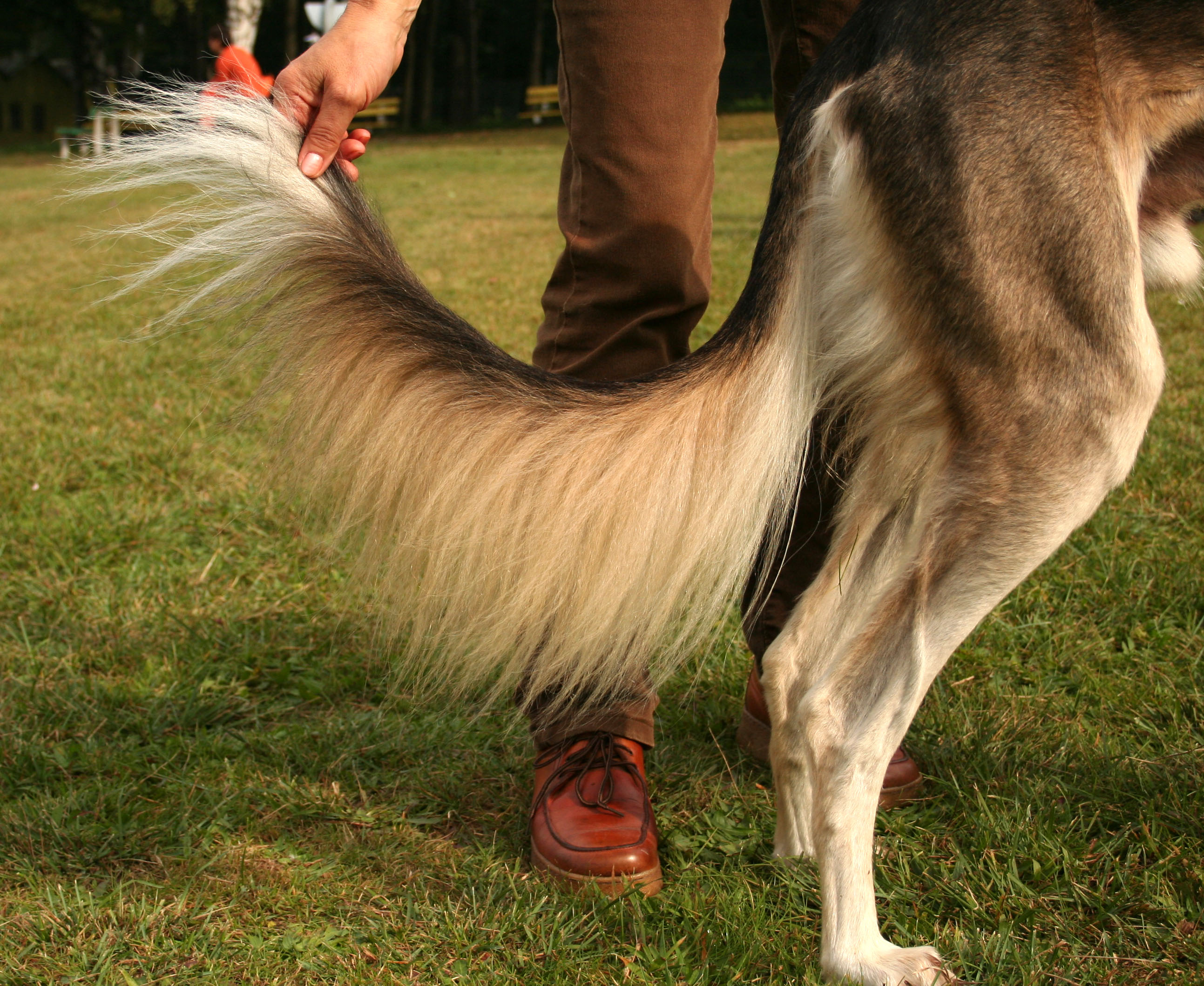 Ogon charta perskiego na krajowej wystawie psów rasowych w Rybniku - Kamieniu.